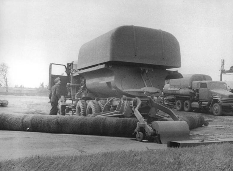 Zentralbild-Stöhr 31.7.1959 Zum 10. Jahrestag der DDR 12 Tage Planvorsprung und Erhöhung des Staatsplanes um 1,1 Millionen DM - Geschenk der Spezialfahrzeugbauer Die Kollegen vom Spezialfahrzeugwerk Berlin-Adlershof wollen bis zum 10. Geburtstag unserer Republik 12 Tage Planvorsprung erreichen. Weiter erhöhen sie den Staatsplan um 1,1 Millionen DM. - Im Wettbewerb stehen sie an der Spitze der Berliner Betriebe. Sie erhielten den kleinen und den großen Bären für ihre ausgezeichneten Leistungen im Wettbewerb zu Ehren des 10. Jahrestages. Den 1. Halbjahrplan erfüllten sie mit 107,4 Prozent, das sind 11 Tage Planvorsprung. UBz. Eine Großkehrmaschine auf dem LKW G 5 bei der Funktionsprobe am Stand. Die Breite der Bürsten beträgt 8 m. Diese Groß-Kehrmaschine kann auf Flugplätzen eingesetzt werden.